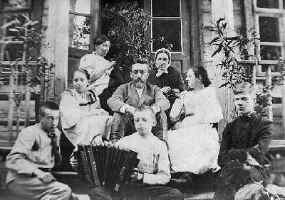 Беларуская (тарашкевіца): Янка Лучына на ганку ў акружэньні сваякоў